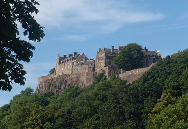 photographie du château de Stirling (Ecosse) prise en juillet 2005 -photographié par moi même (Joyce11)